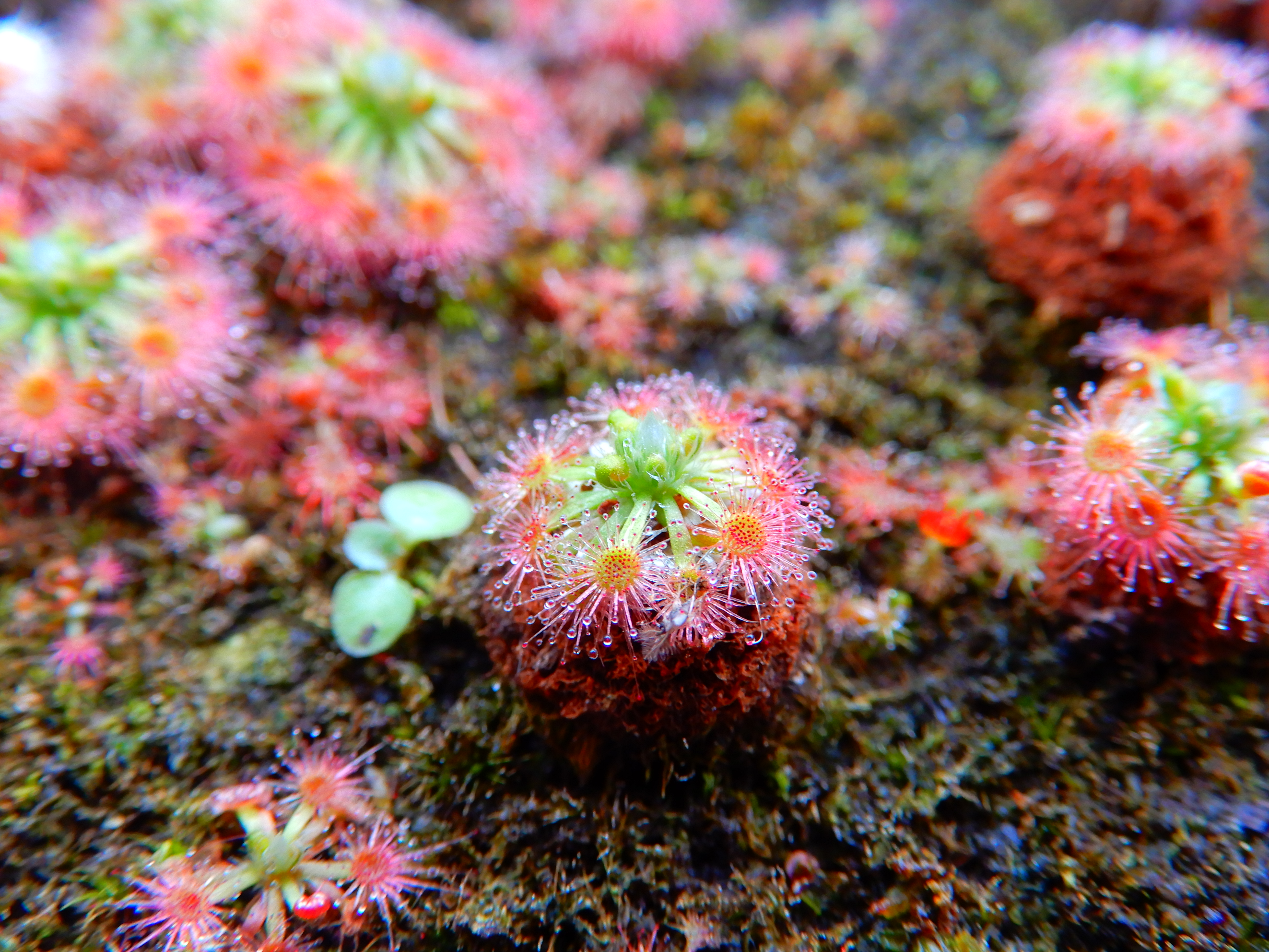 一種迷你毛氈苔